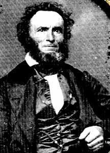 Friedrich Münch (1799-1881) Sonstiges: ...